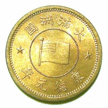 Manchukuo 0.5 FEN（满洲国5厘硬币，康德元年）